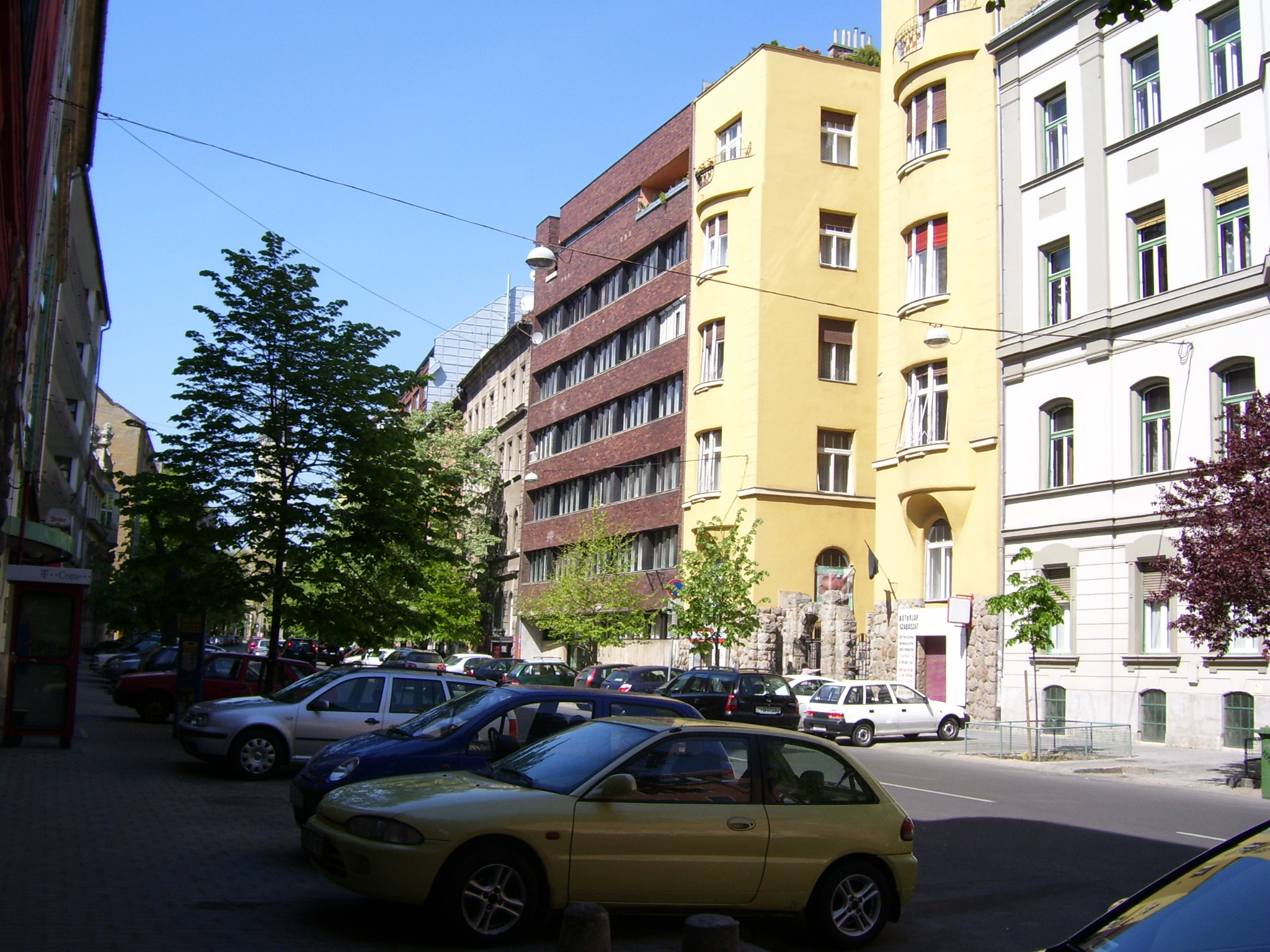 Budapest XII., Maros utca 13. alatti társasház (tervezte Rimanóczy Jenő)